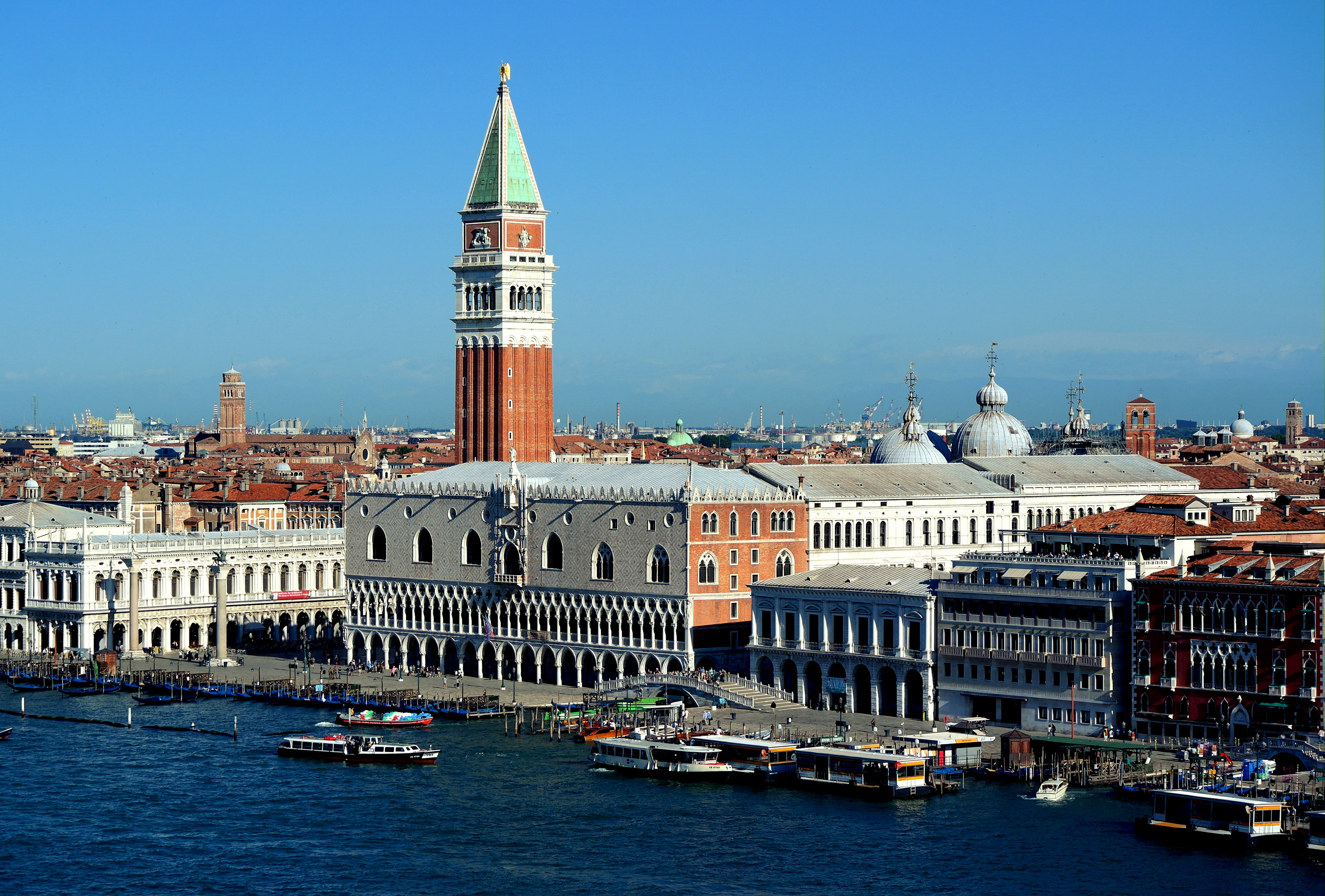 Veduta di Palazzo Ducale e del campanile di San Marco a Venezia